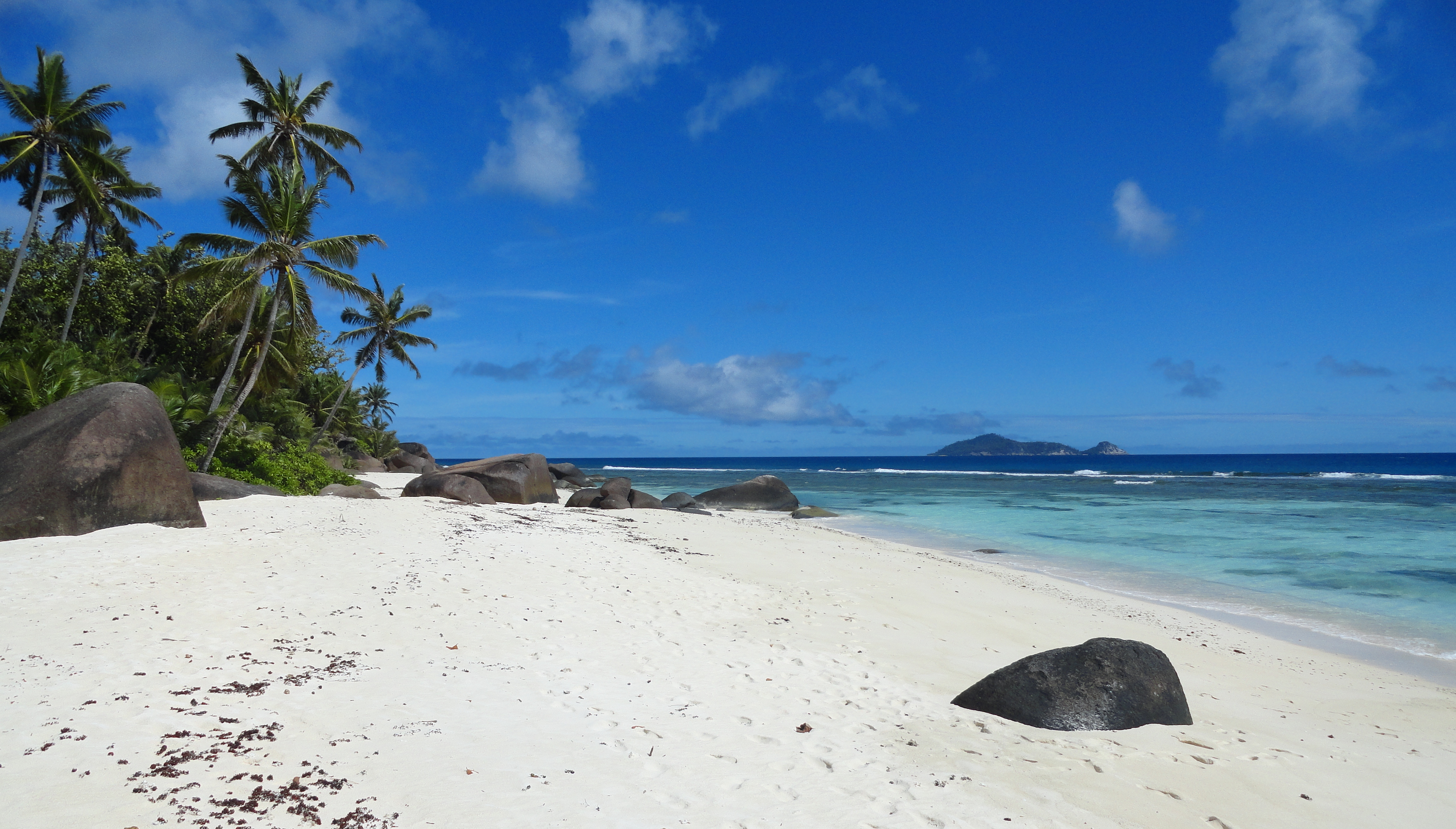 La spiaggia principale dell'isola di Silhouette, la terza più grande come estensione delle Seychelles. Sull'isola c'è un piccolo villaggio, La Passe abitato da non più di 200 persone, ed un unico resort, l'Hilton Labriz. Se non sei ospite per accedere sull'isola devi contattare in precedenza l'albergo ed acquistare un package composto dai trasferimenti in motoscafo veloce (45 minuti dal molo di Bel Ombre sull'isola di Mahe) e dal pranzo. La spiaggia è, in assoluto, una delle più belle e spettacolari di tutto l'arcipelago. The Beach at Silhouette Island in the Seychelles Archipelago, Indian Ocean. Access is by private boat only (no public services) from Bel Ombre jetty in Mahe Island. Please contact Hilton Labriz Resort in Silhoutte for further info. This is one of the most spectacular beaches of all the Seychelles Archipelago.